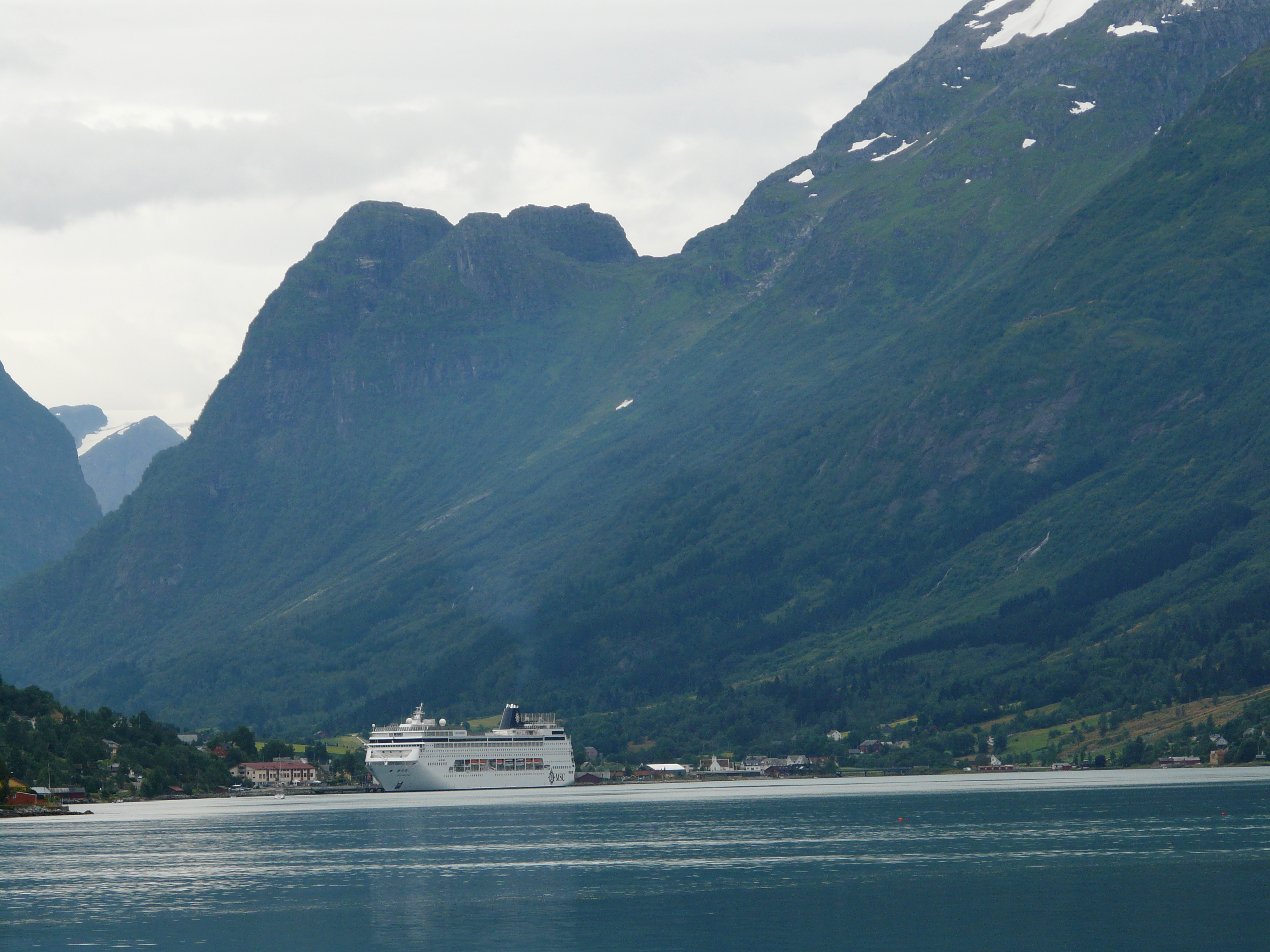 Olden